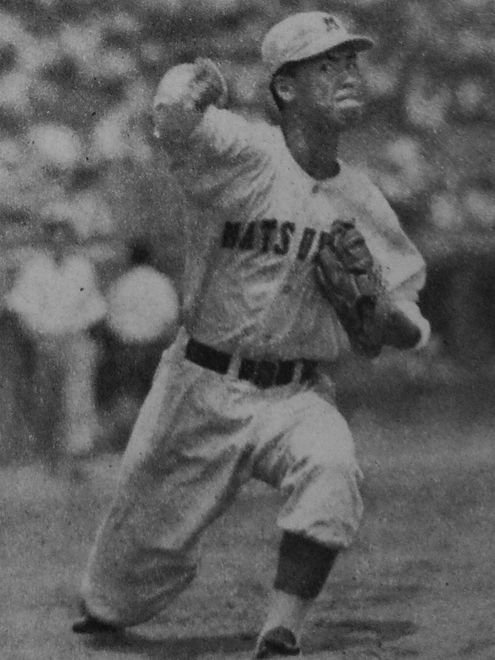 空谷泰